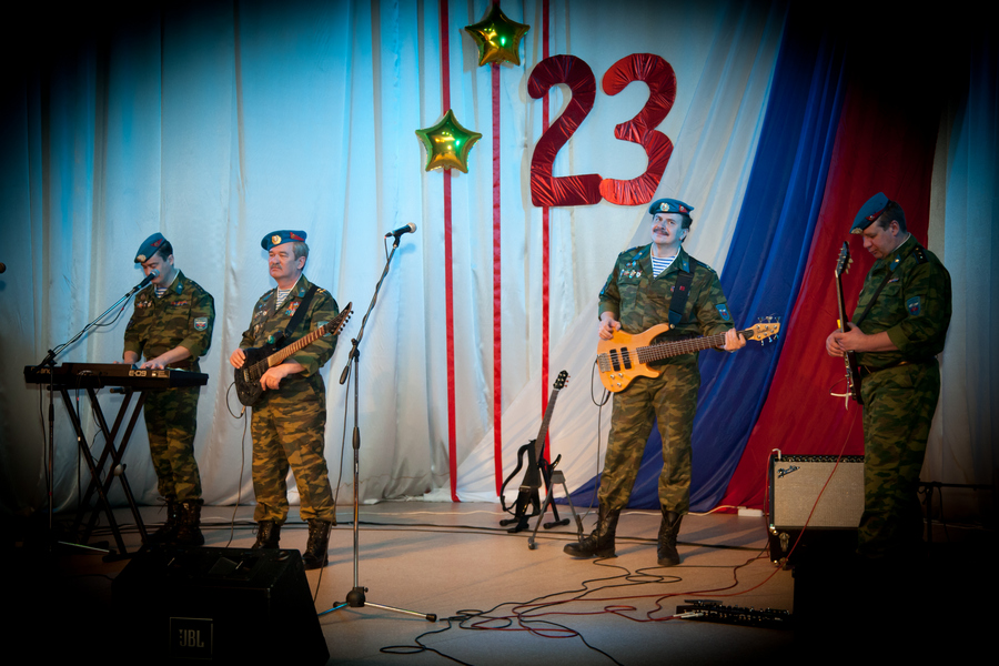 Голубые береты; концетр в МАУ «Центр культуры и общественных мероприятий»